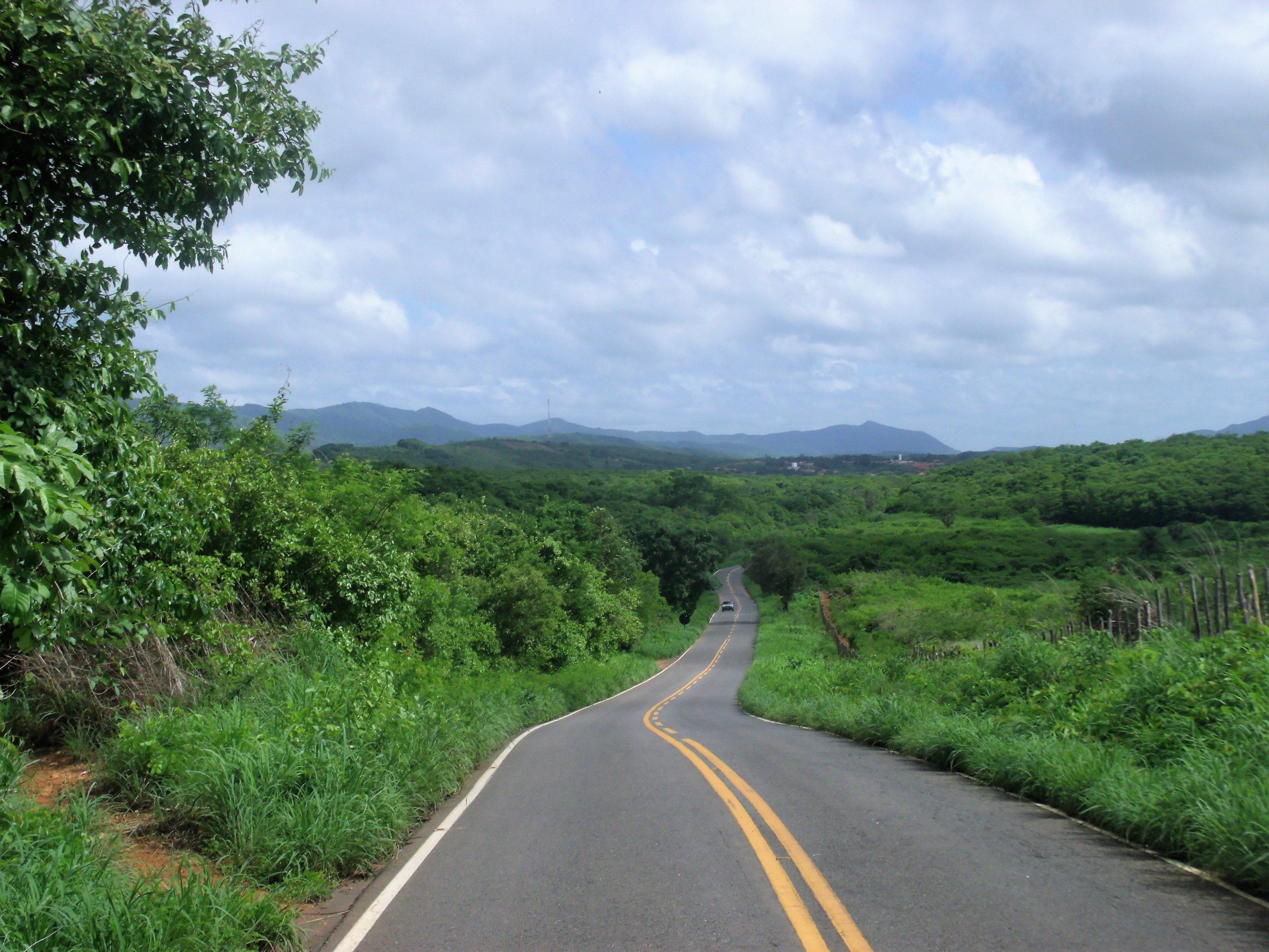 Rodovia CE-240 perto de Arapá no pé da Serra Grande em Tianguá, sentido Coreaú.